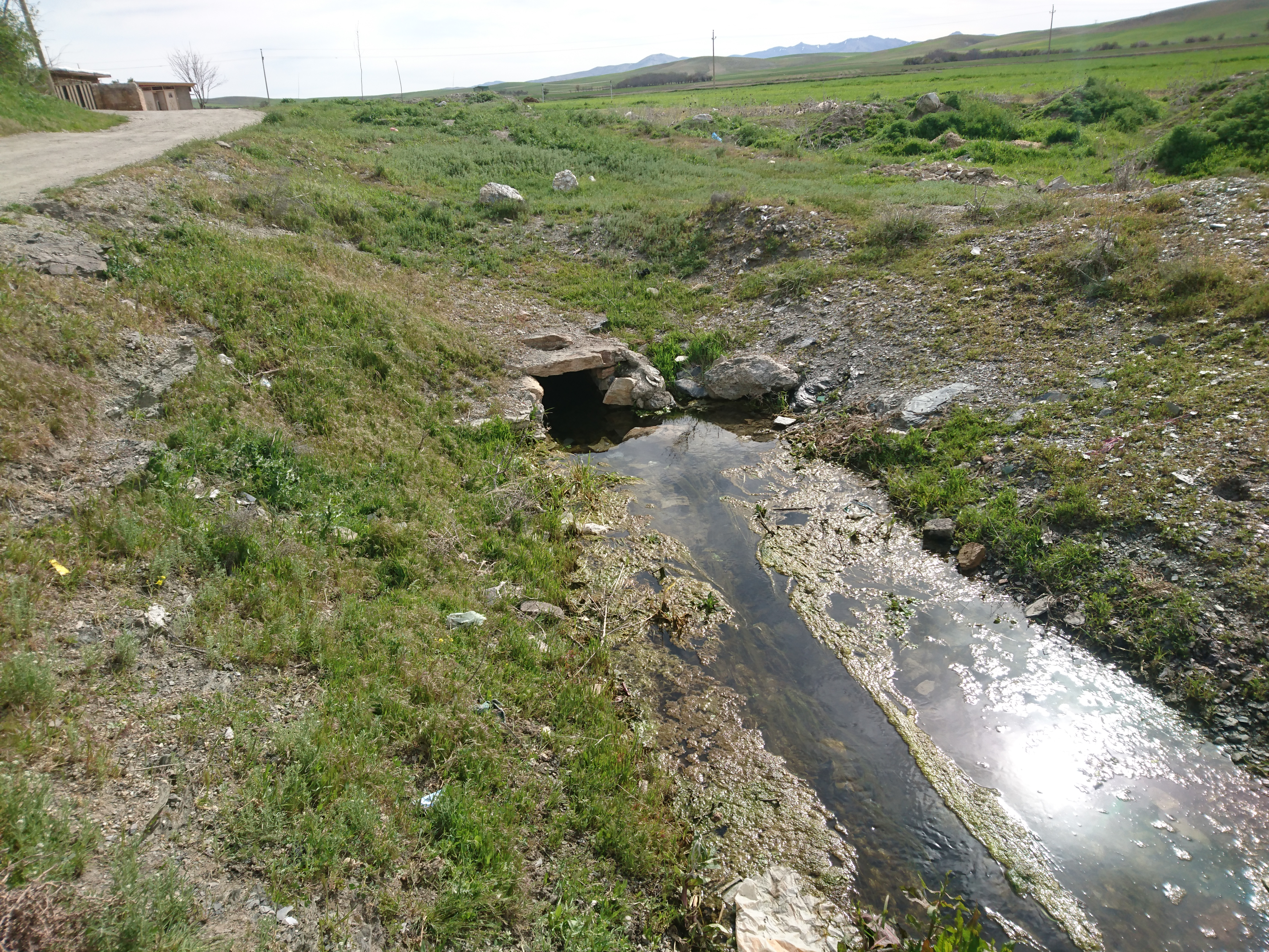 قنات قدیمی روستای رحمان آباد شهرستان ملایر